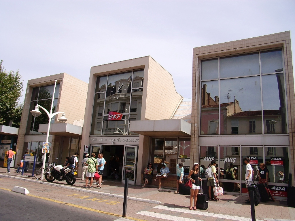 La gare de Saint-Raphaël-Valescure à Saint-Raphaël (83)